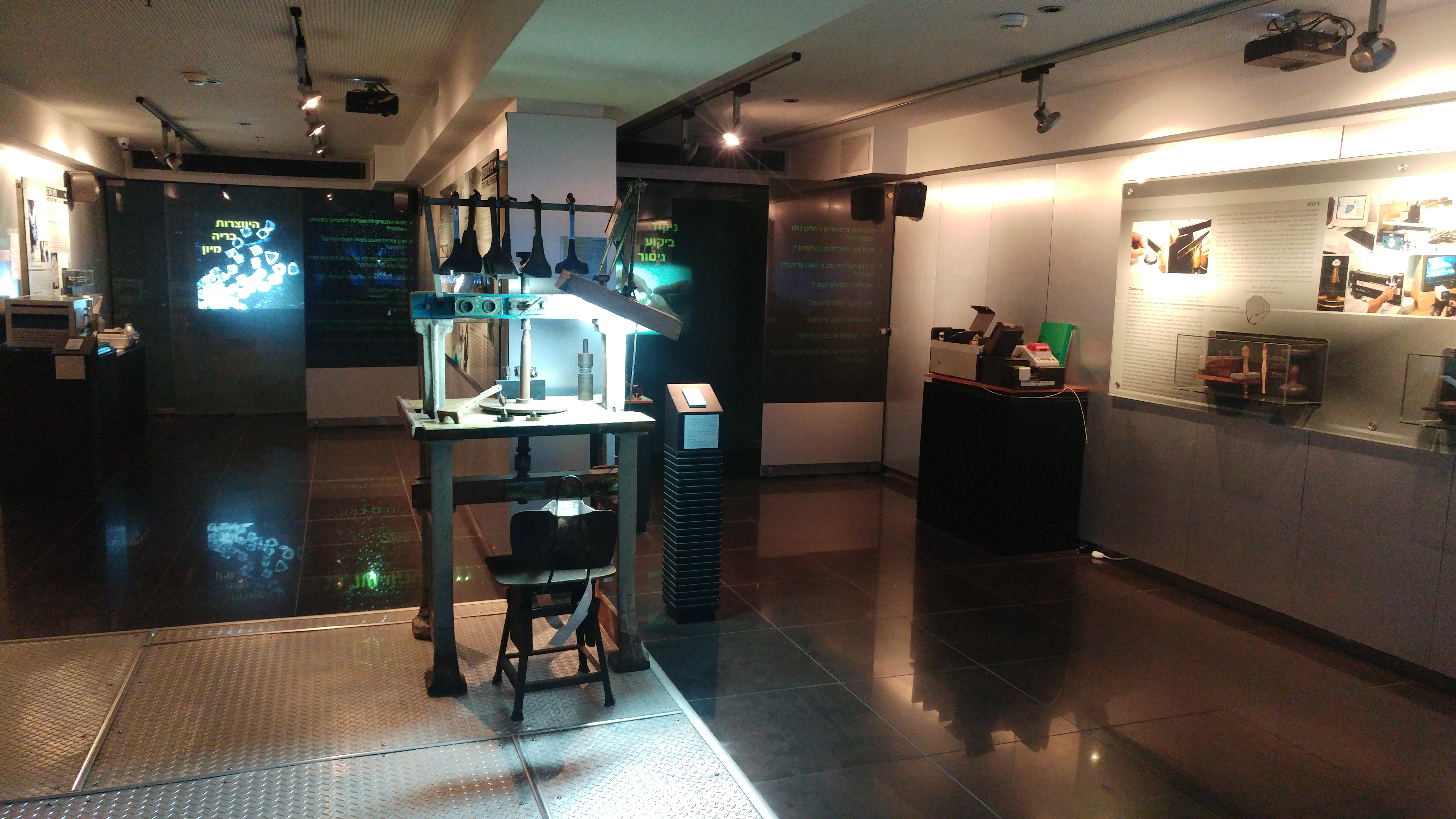 מבט על פנים המוזיאון